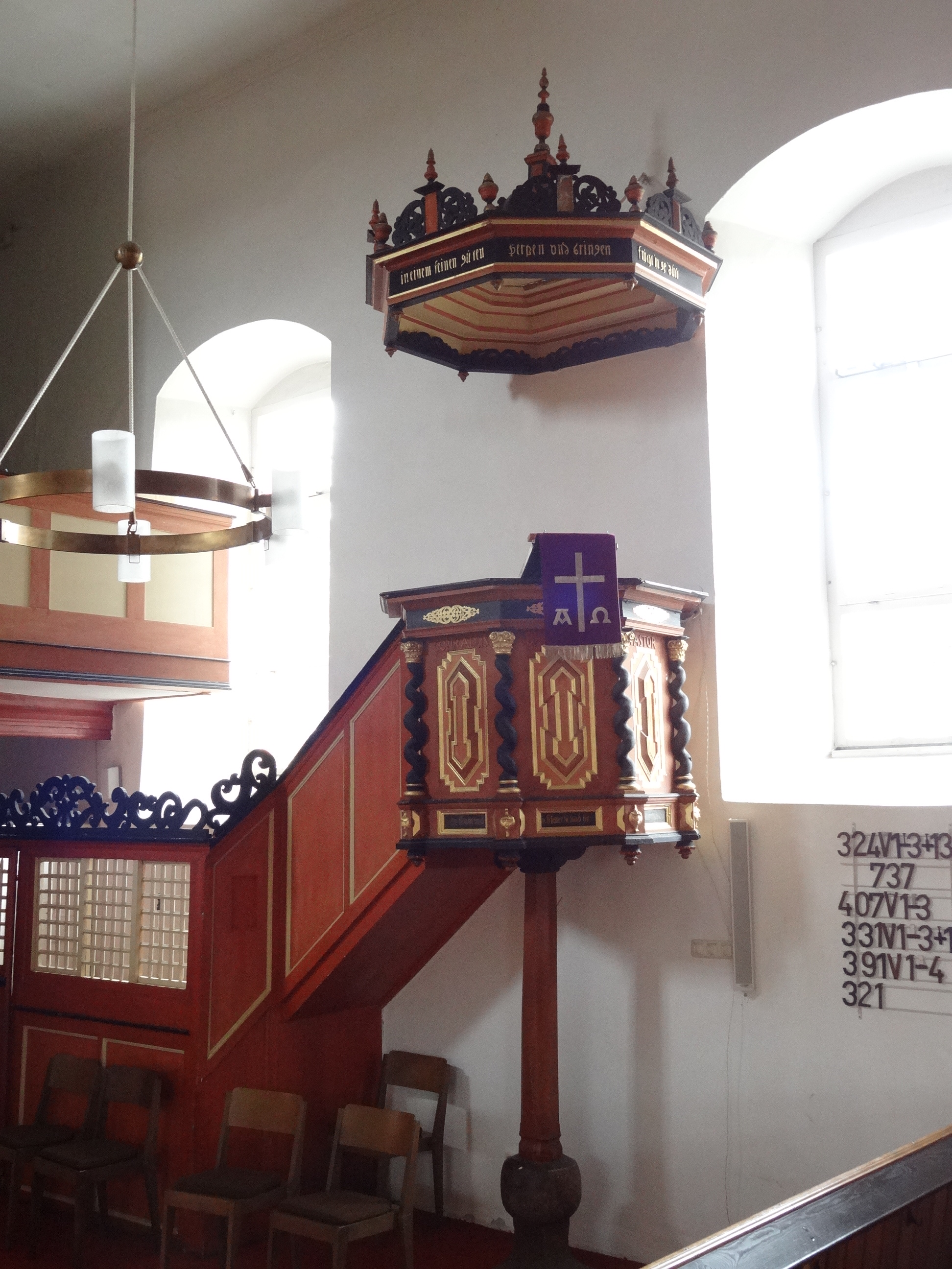 Evangelische Kirche (Ulfa)